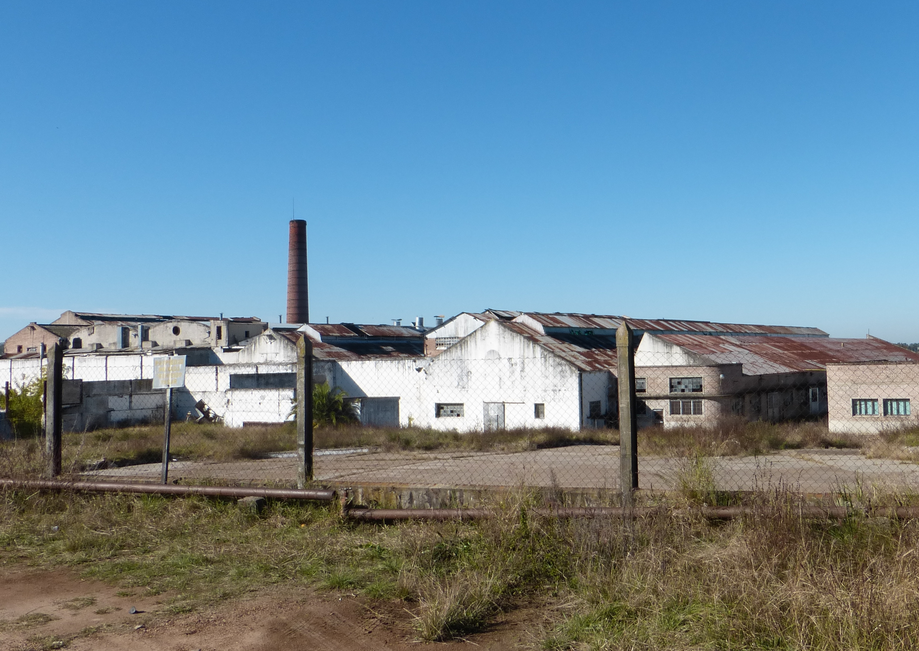 Vista de las instalaciones abandonadas de la Liebig Extract of Meat Company en Pueblo Liebig, Entre Ríos, Argentina.